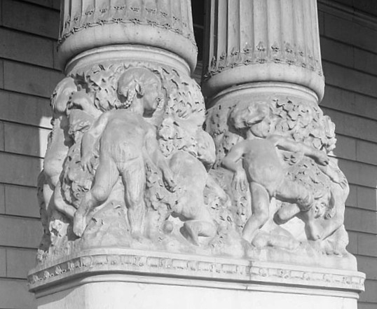 Dramaten 1943, kolonnrelief av Carl Milles